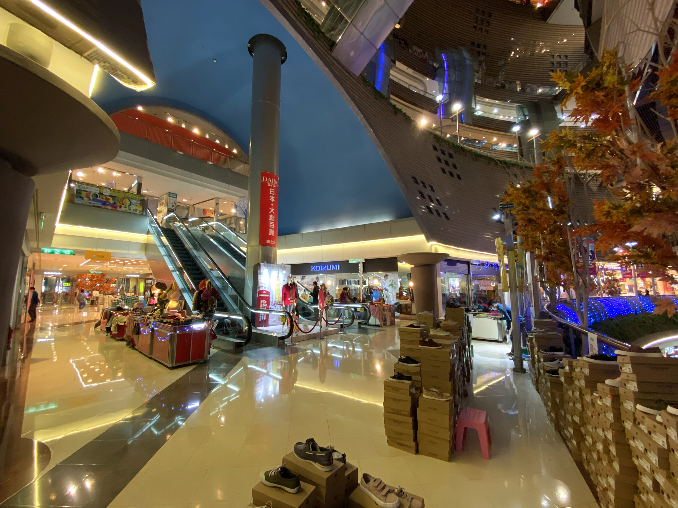 Living Mall Level 1